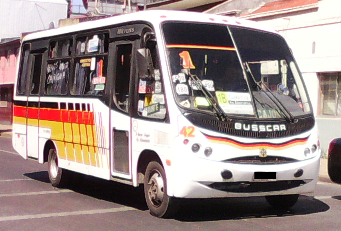 Ómnibus de la línea 1B de la ciudad de Temuco, Chile, en la calle Manuel Montt.